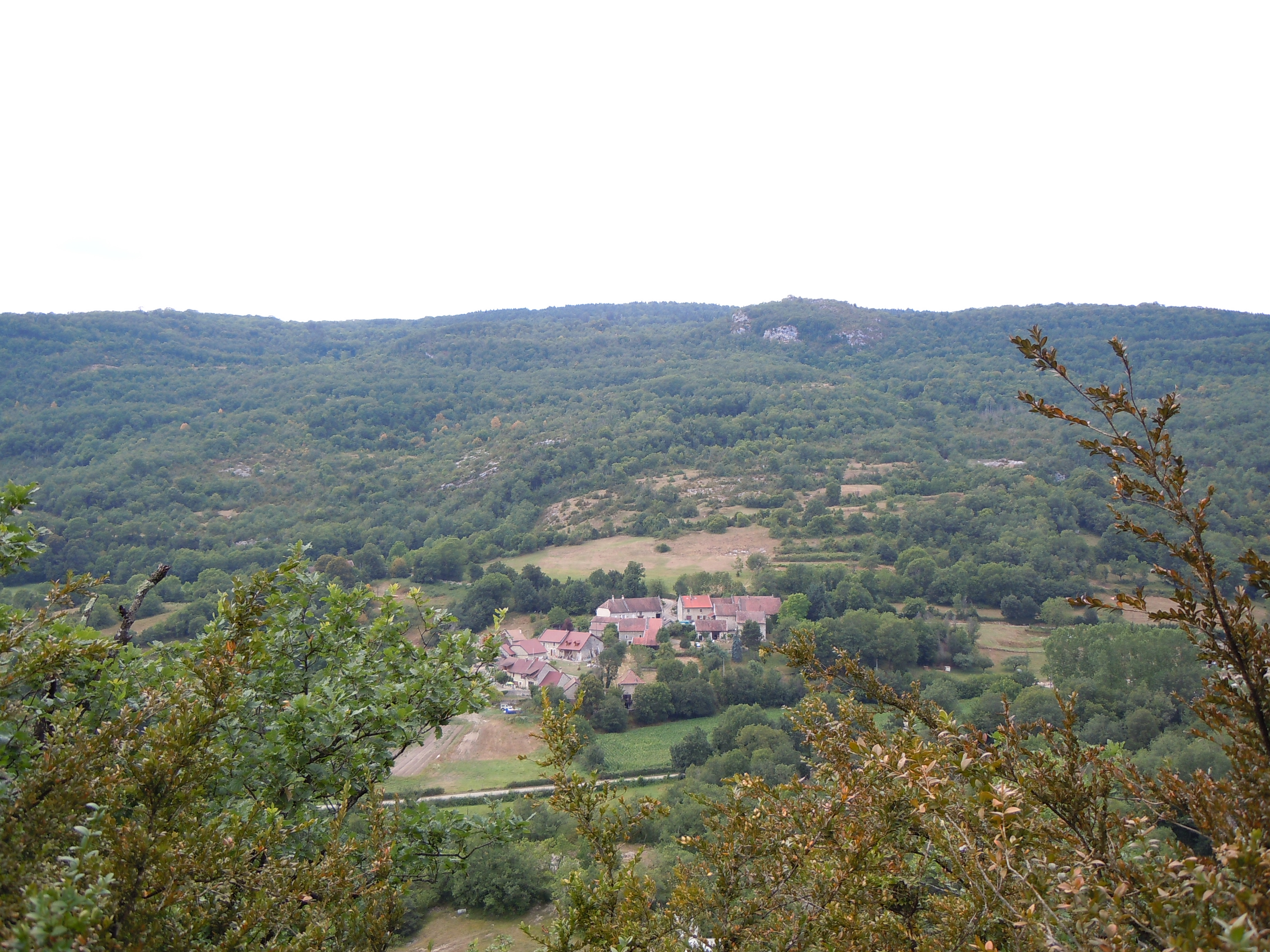 Fay - Hameau de la commune de Peyrieu dans l'Ain (France) - depuis le Mont Gela